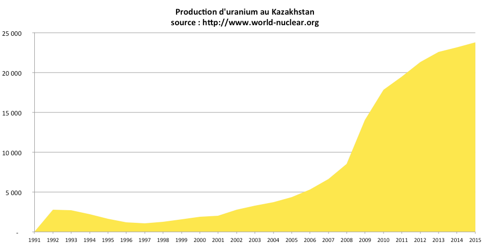 Production d'uranium en tonnes par an au Kazakhstan depuis 1991 (suite à l'indépendance du pays).